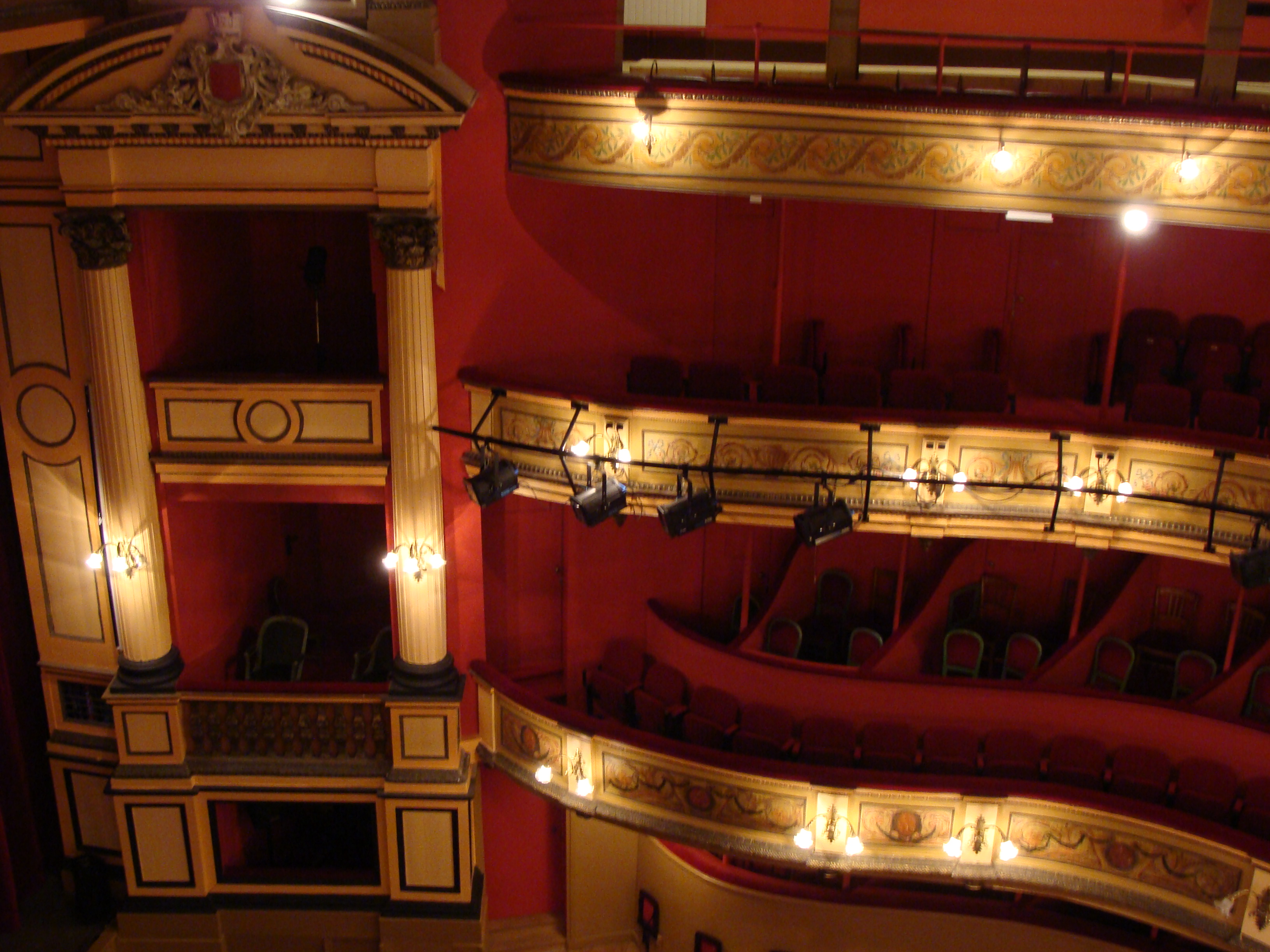 Loge de proscenium ou d'avant scène coté cour, dite loge royale, détail de la salle à l'italienne du Théâtre municipal de Douai, Nord, France.